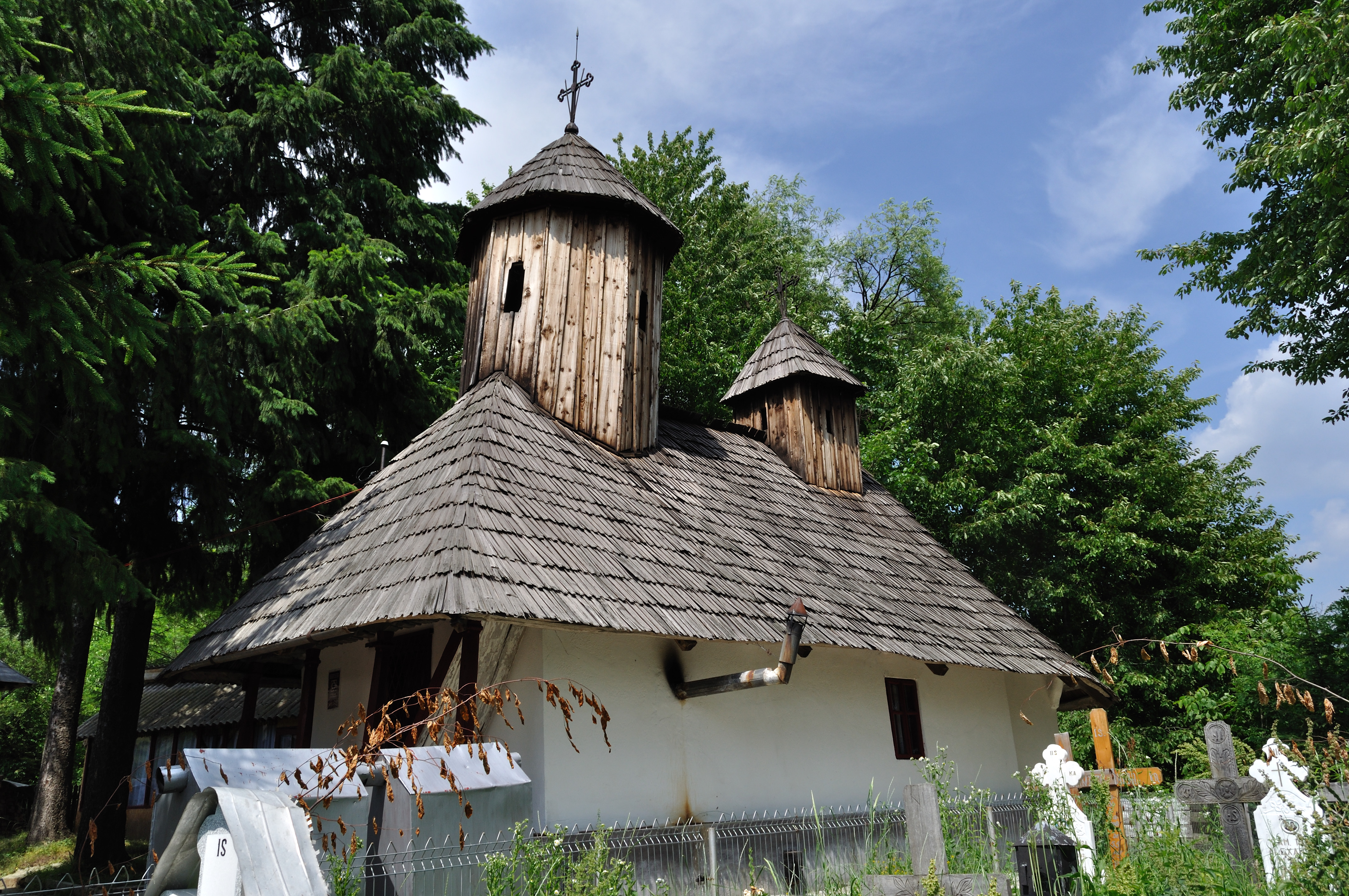 Biserica de lemn „Cuvioasa Paraschiva” din Dumbrăveşti, Vâlcea